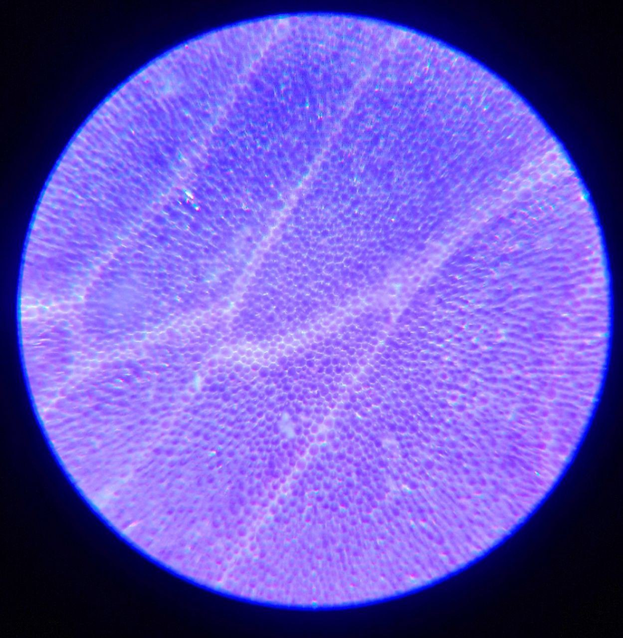 Антоцианы в растительных клетках. Фото под микроскопом при 4-кратном увеличении. Вид растения определить не удалось. Лиловый лепесток.